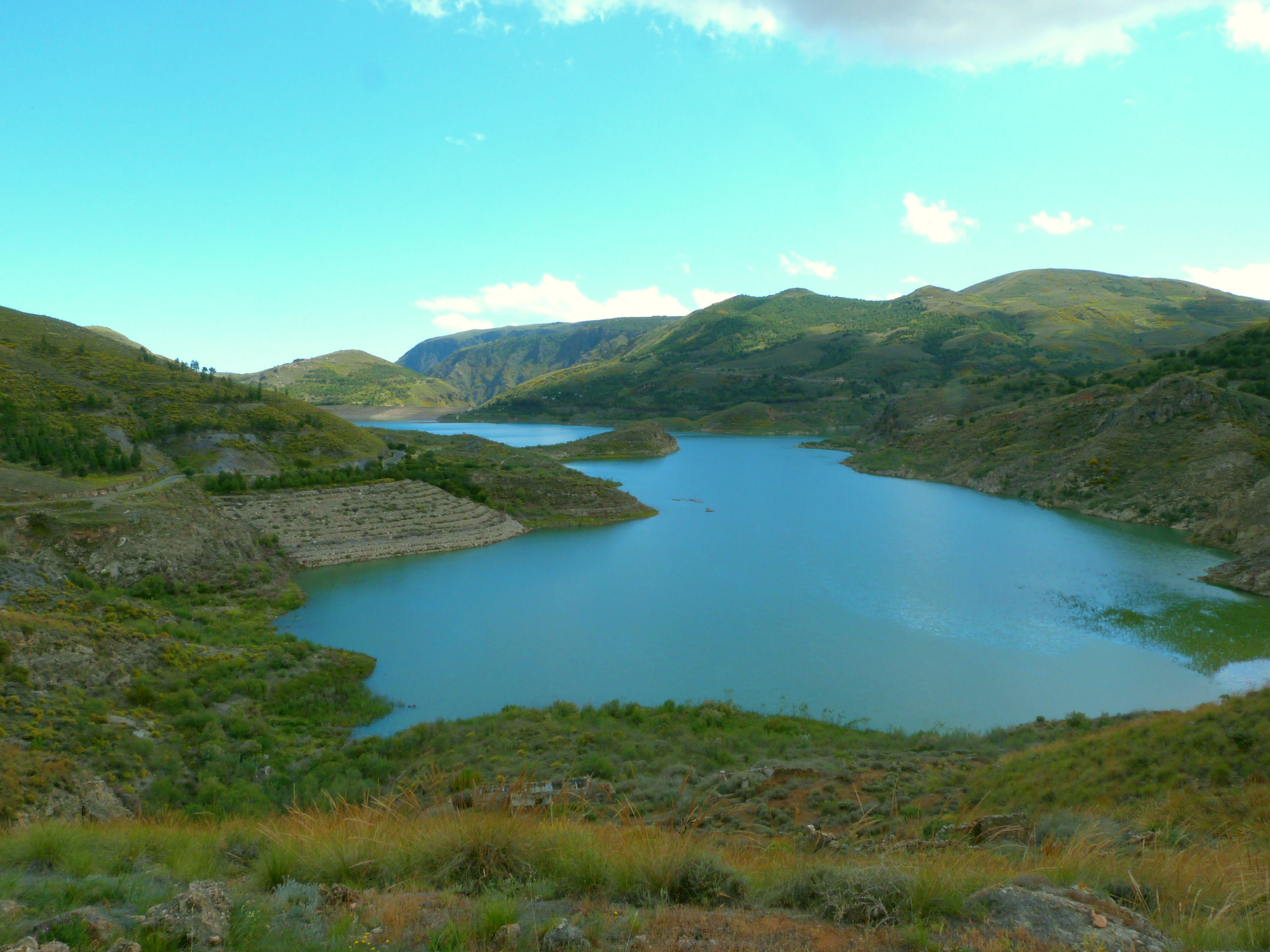 Embalse de Béznar